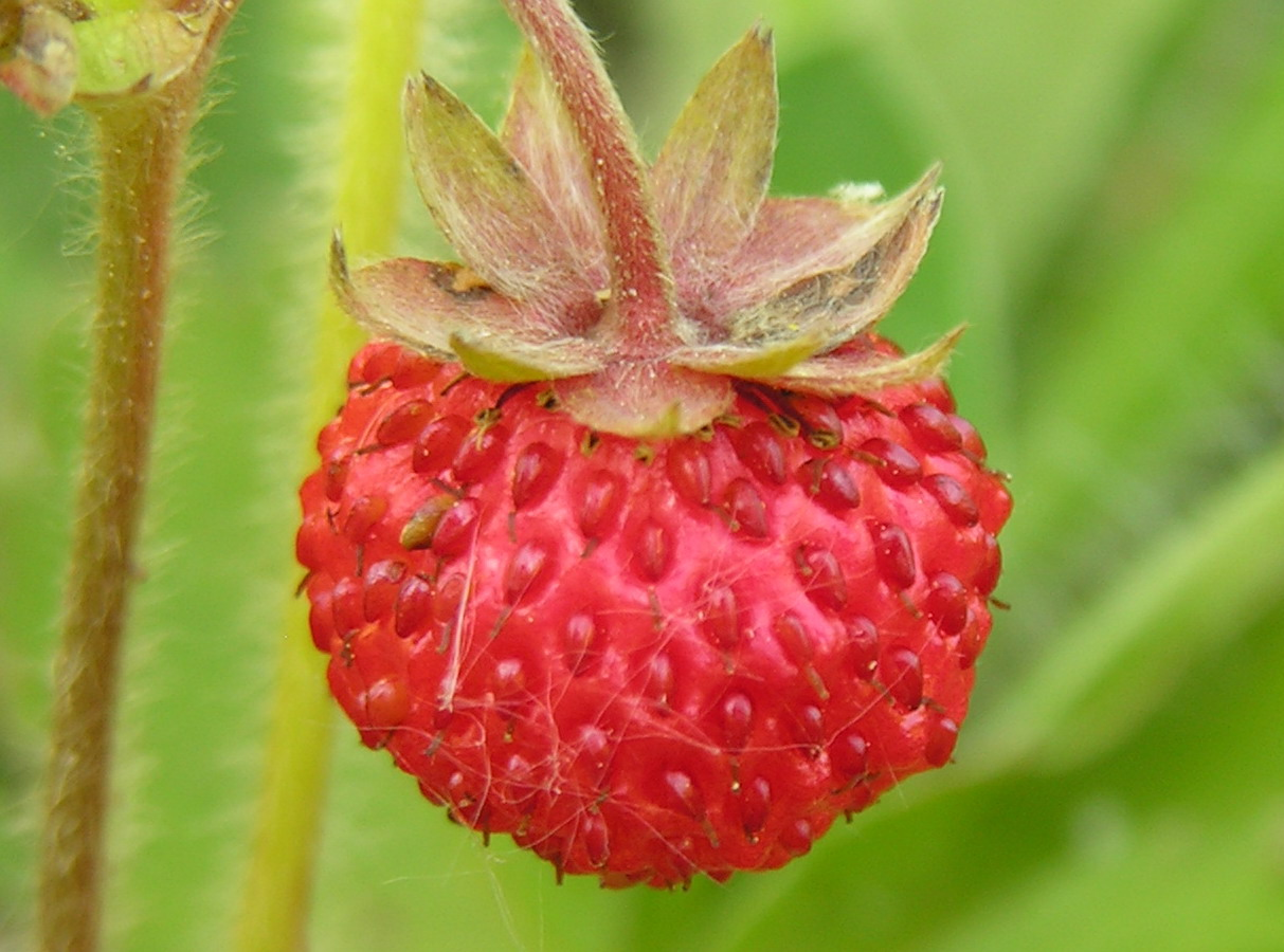 Šlaitinė žemuogė, uoga Šeima. Erškėtiniai (Rosaceae) Is not Fr.viridis! Fr.moschata?